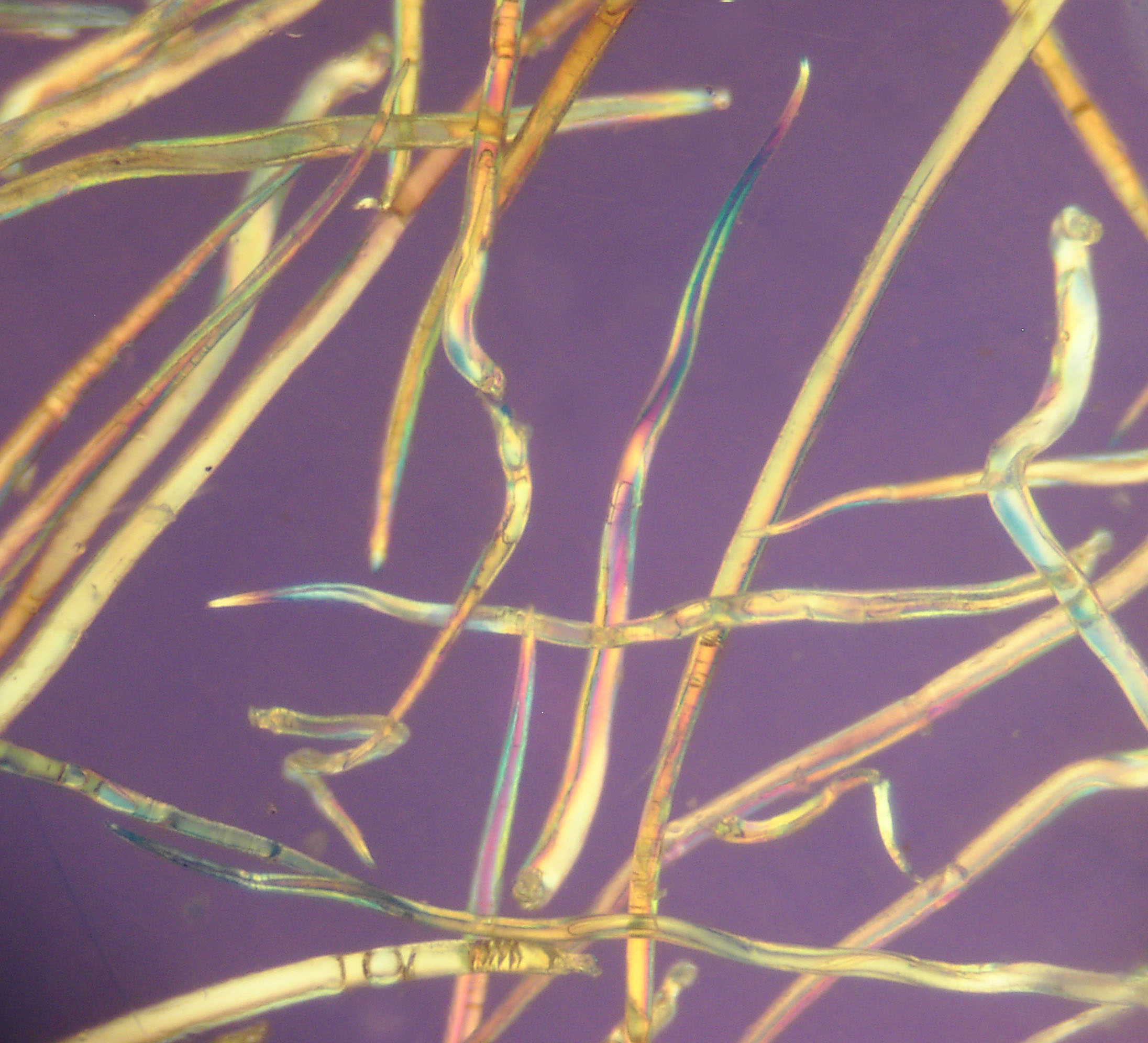 Pflanzenhaare bei 200 fach mit Polfilter